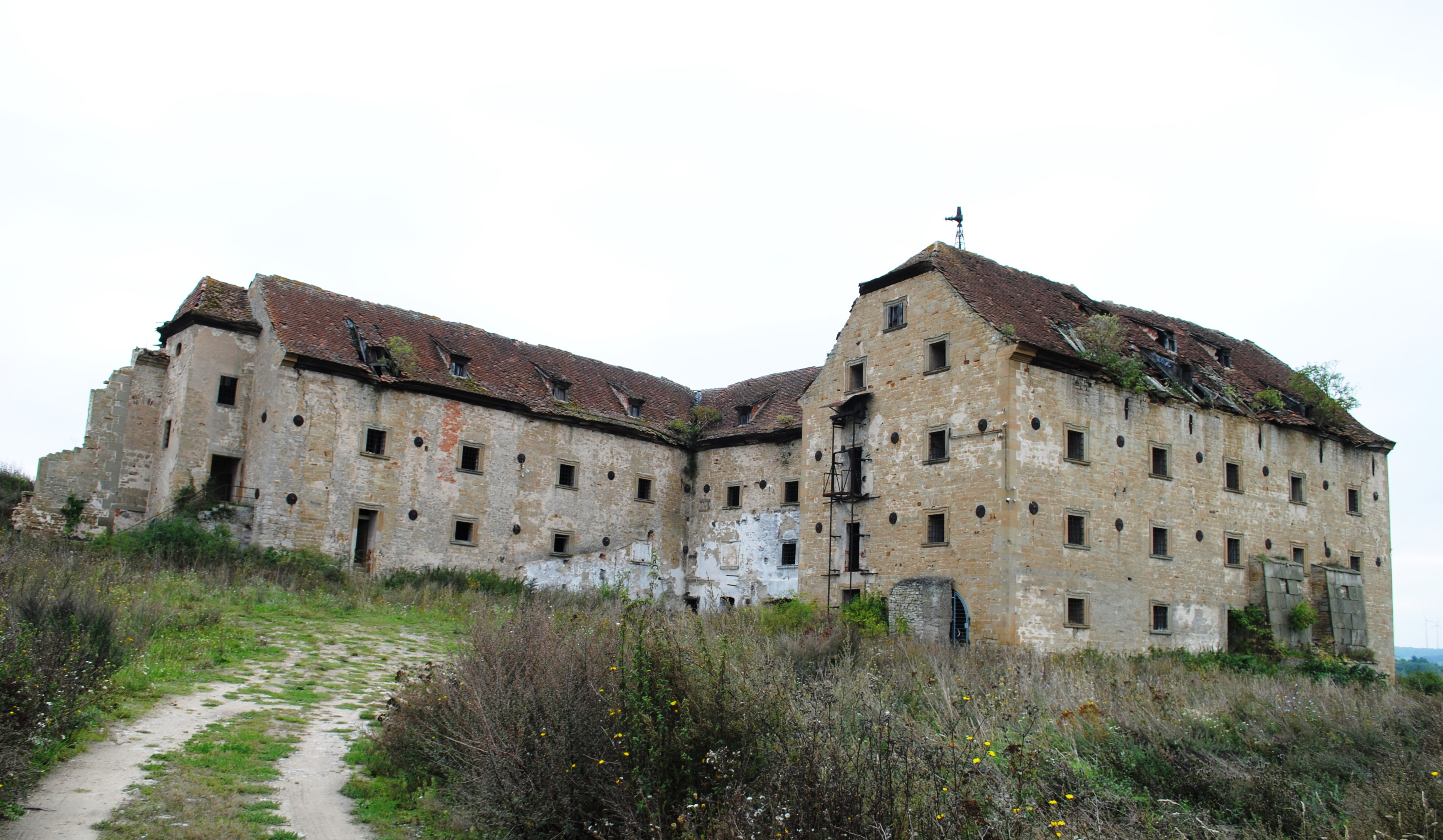 Gut Öttershausen, Panorama, NordenThis is a photograph of an architectural monument.